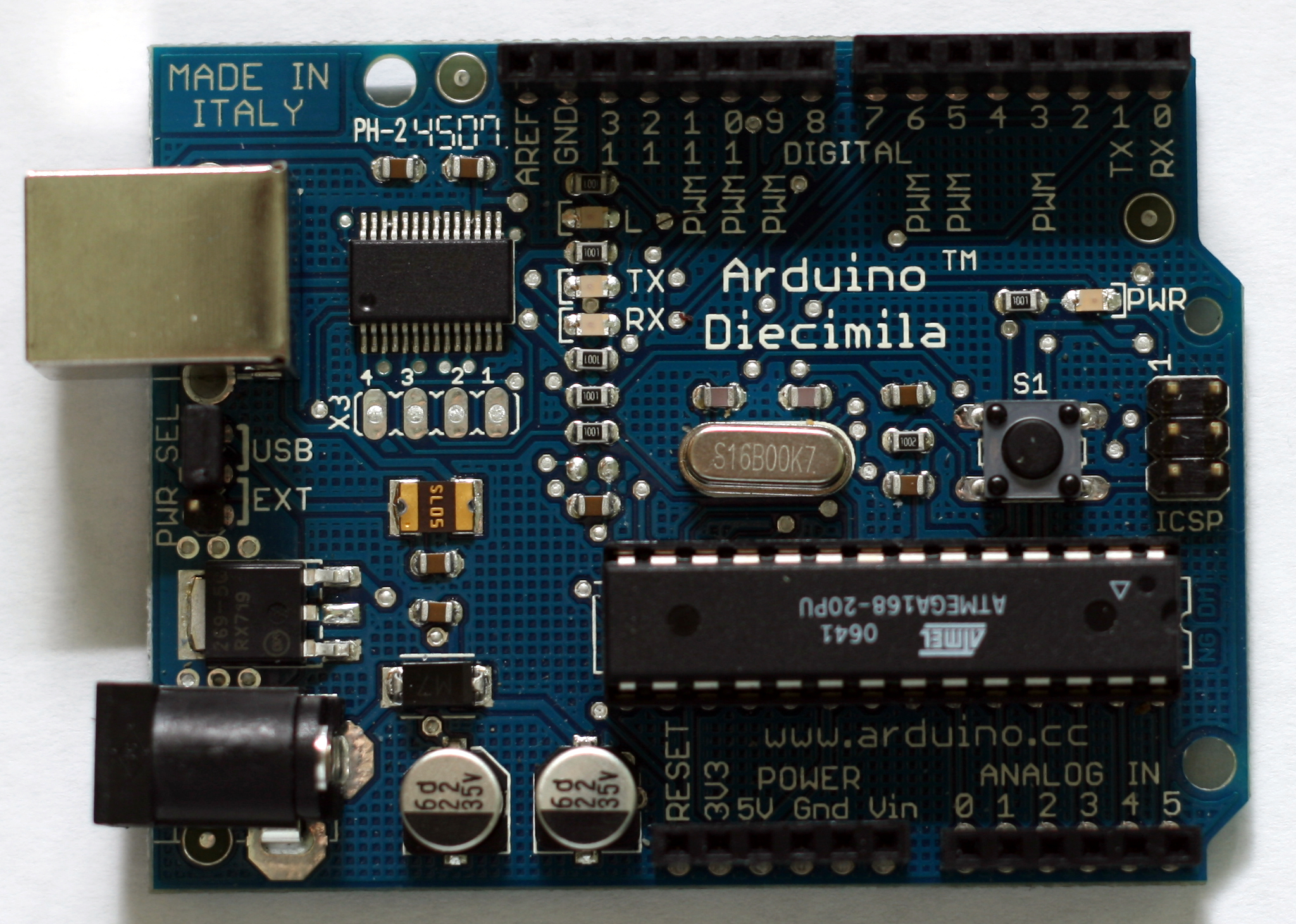 Une carte Arduino Diecimila, Atmel ATMEGA168